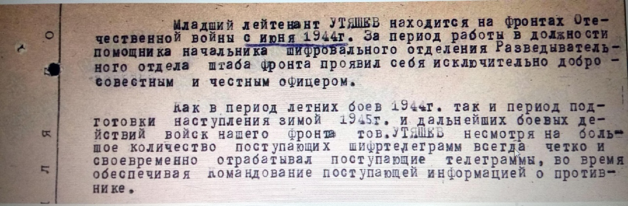 Татарча/tatarça: документ